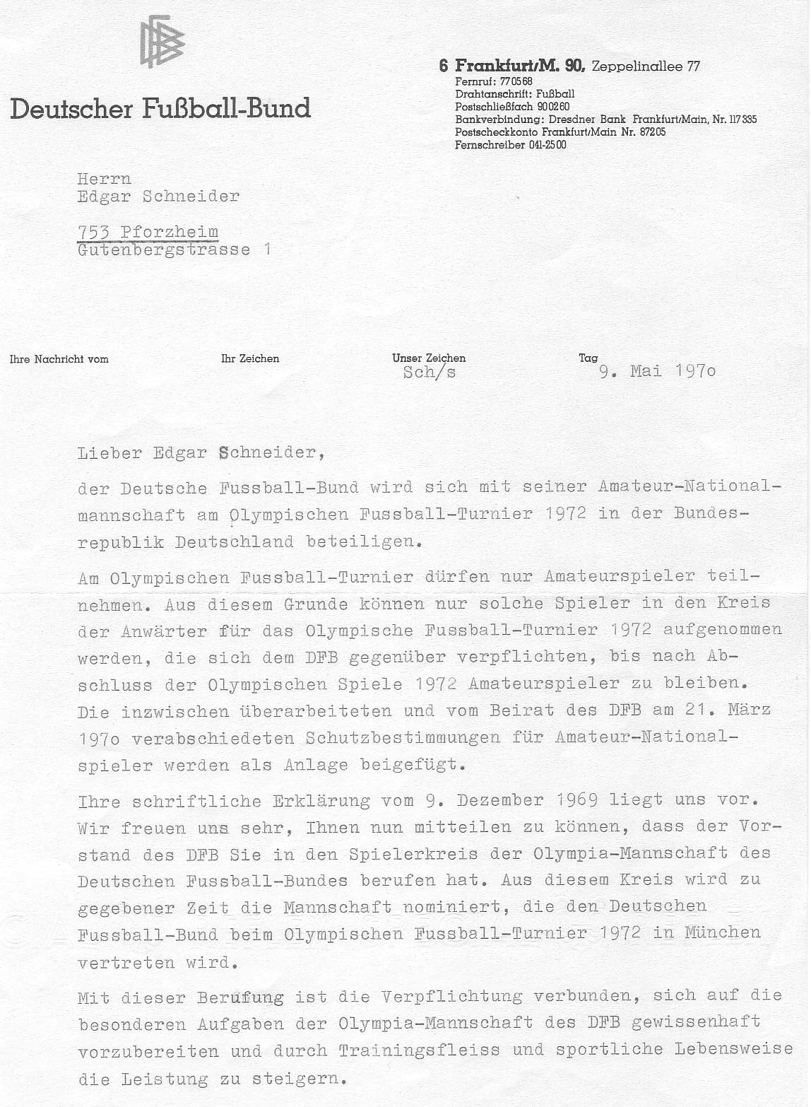 Einberufung in den Kreis der Fußball-Olympiamannschaft des DFBs 1972.